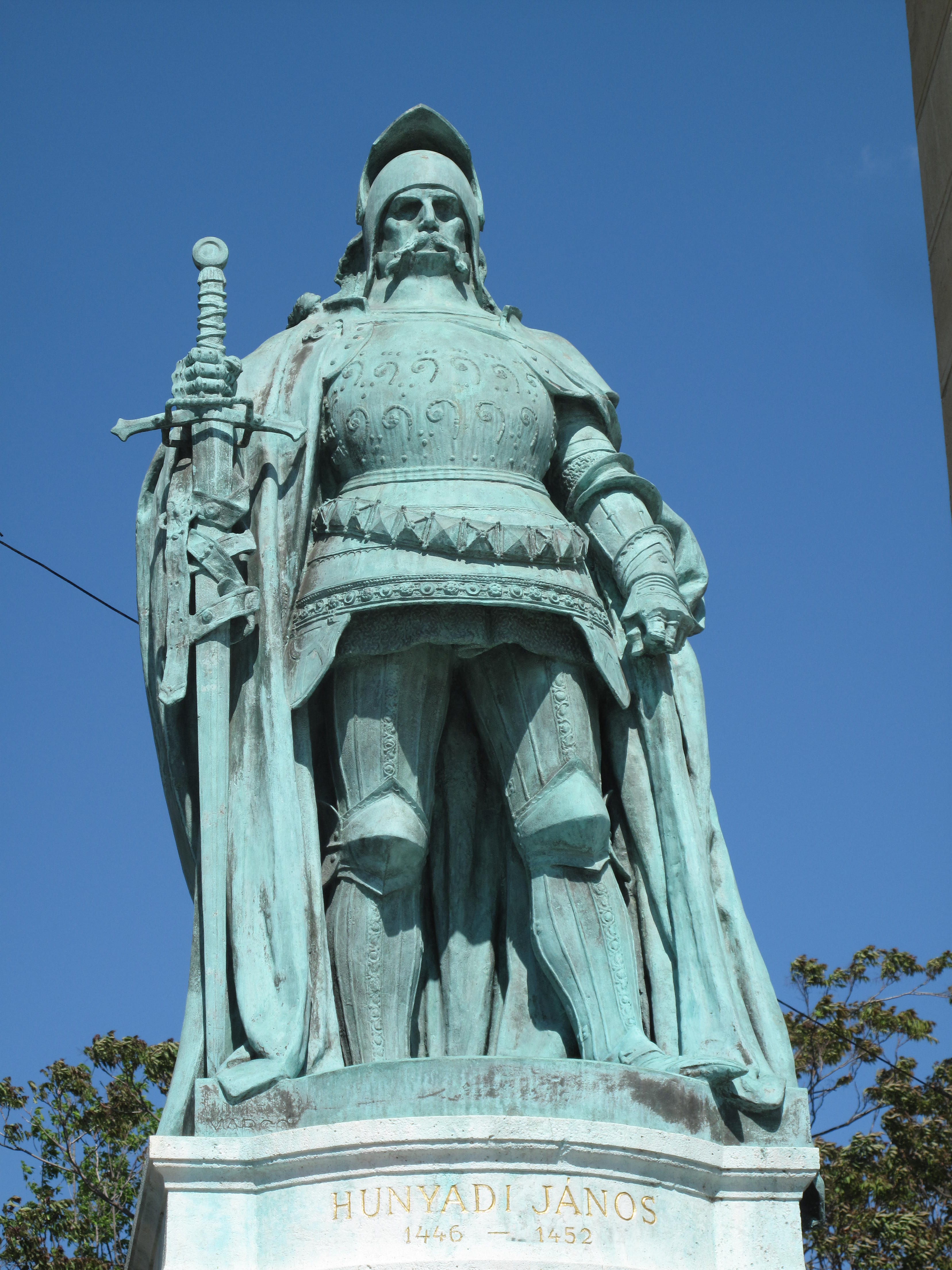 Náměstí Hrdinů, Budapešť